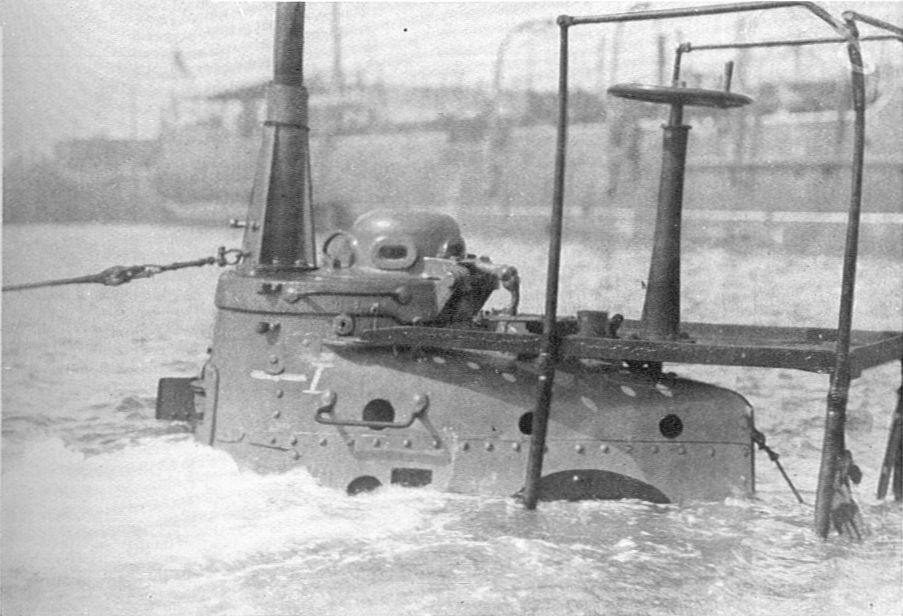 HMS A10